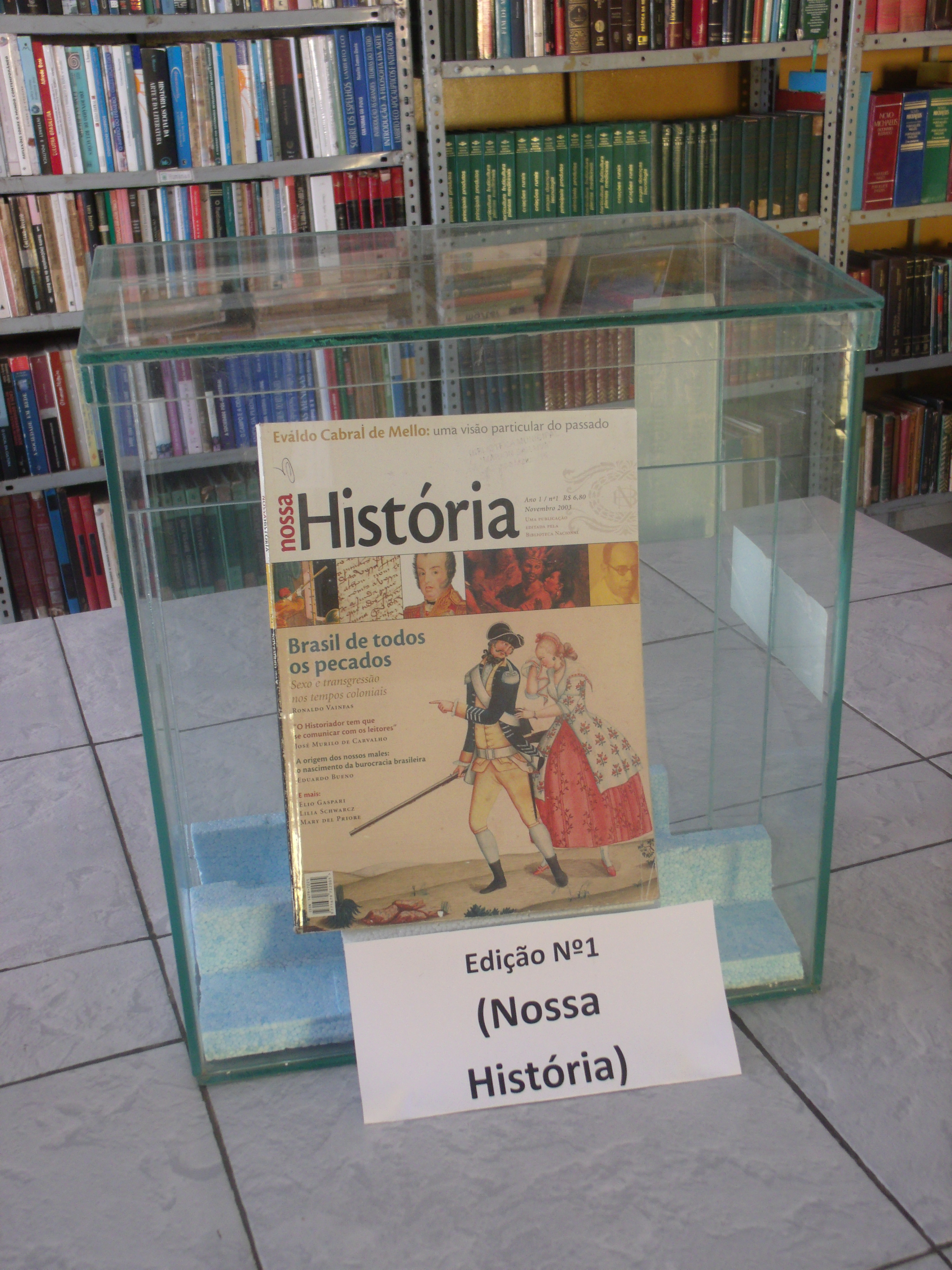 Exposição de revista contemporâneas do Brasil. Edição número 1 da extinta revista Nossa História, de 2003, antecessora da Revista de História da Biblioteca Nacional.